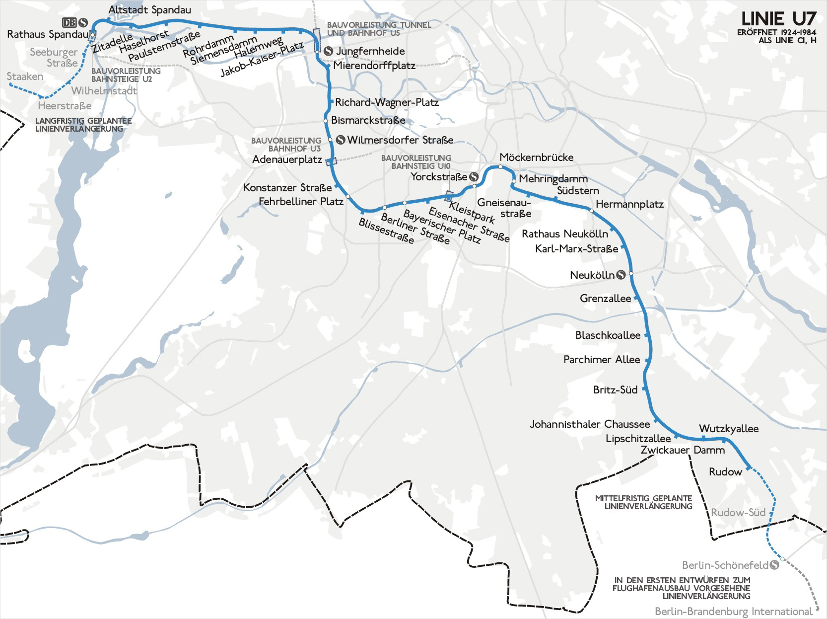 Map of the Berlin Metroline U7